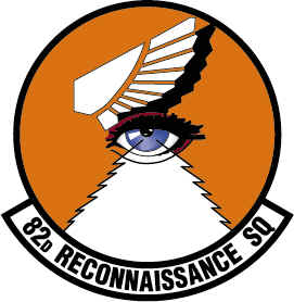 82d Reconnaissance Squadron emblem